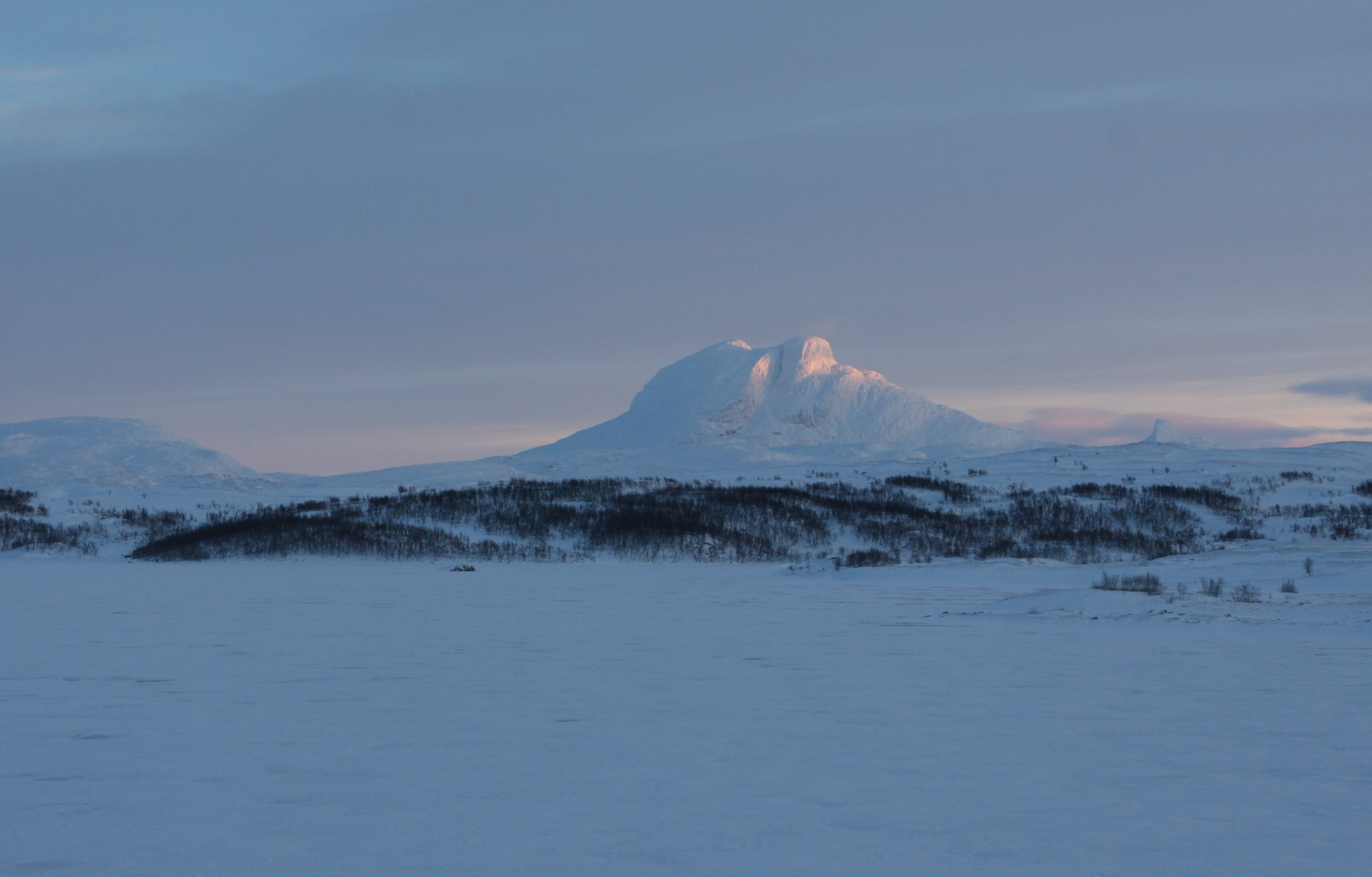 Nord- Saulo og Fuglevatn i Junkerdal nasjonalpark, Saltdal kommune i Nordland fylke.